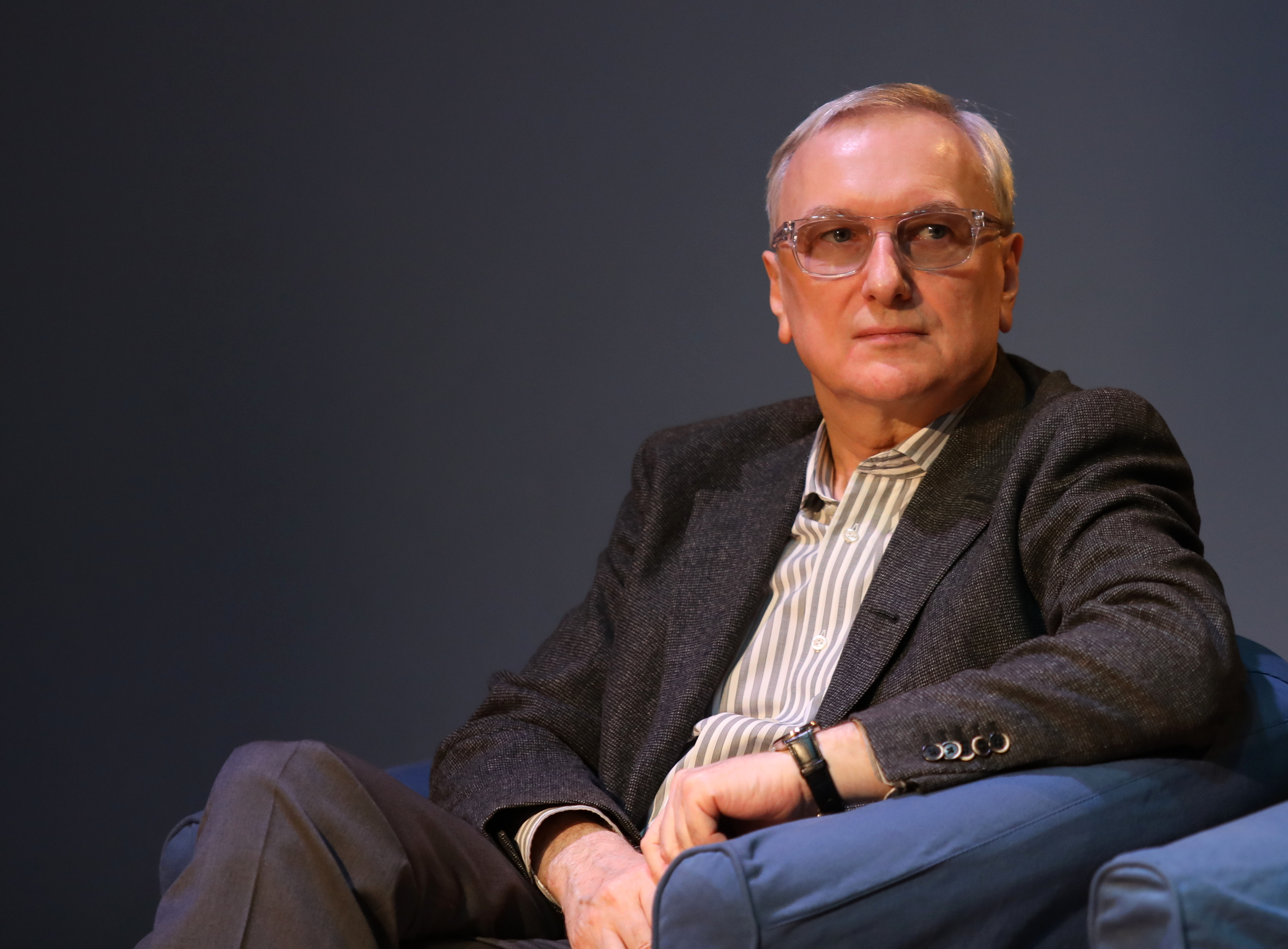 Сергей Анатольевич Зернов (ген. директор киностудии им. Горького) на юбилейном показе фильма "Мио, мой Мио" в Российской государственной детской библиотеке.